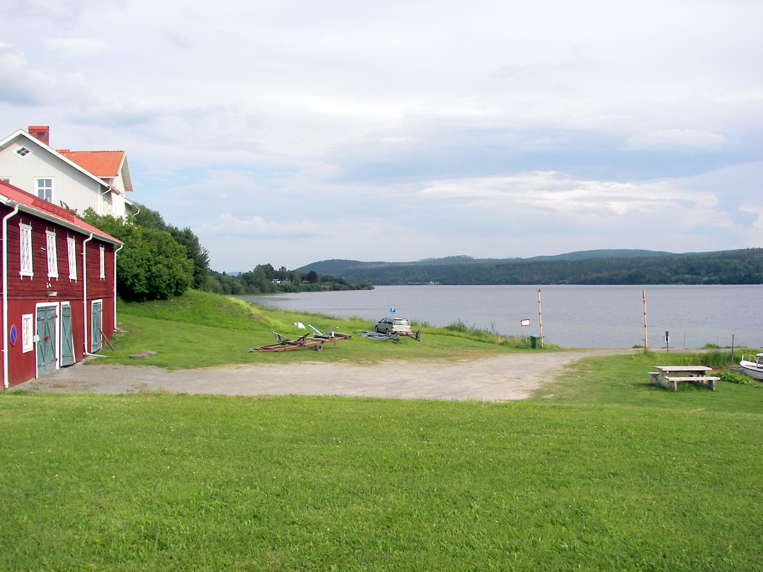 Torpssjön sett från området intill Torps sockenmagasin i Fränsta.